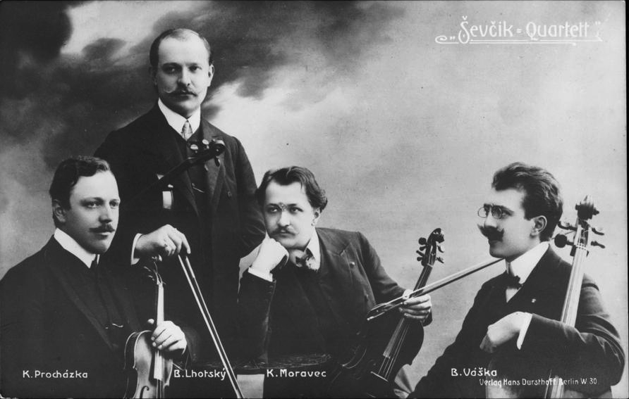 Ševcik Quartet: Karel Procházka, Bohuslav Lhotský, Karel Moravec, Bohuslav Váska